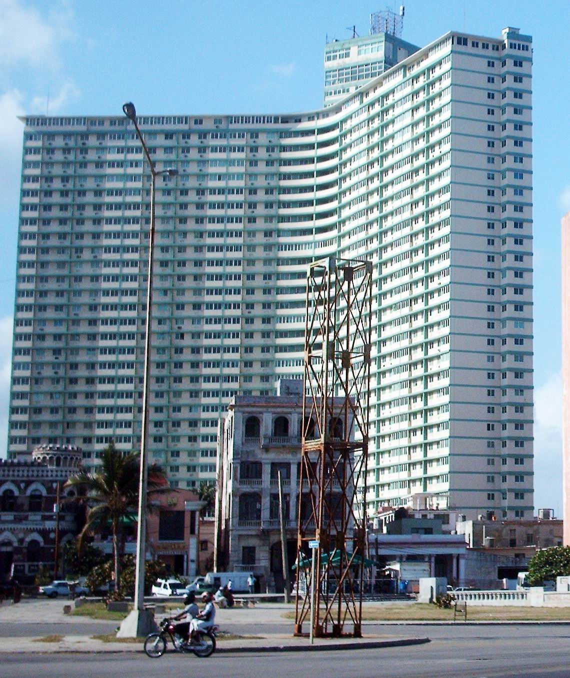 Edificio Focsa, La Habana ?